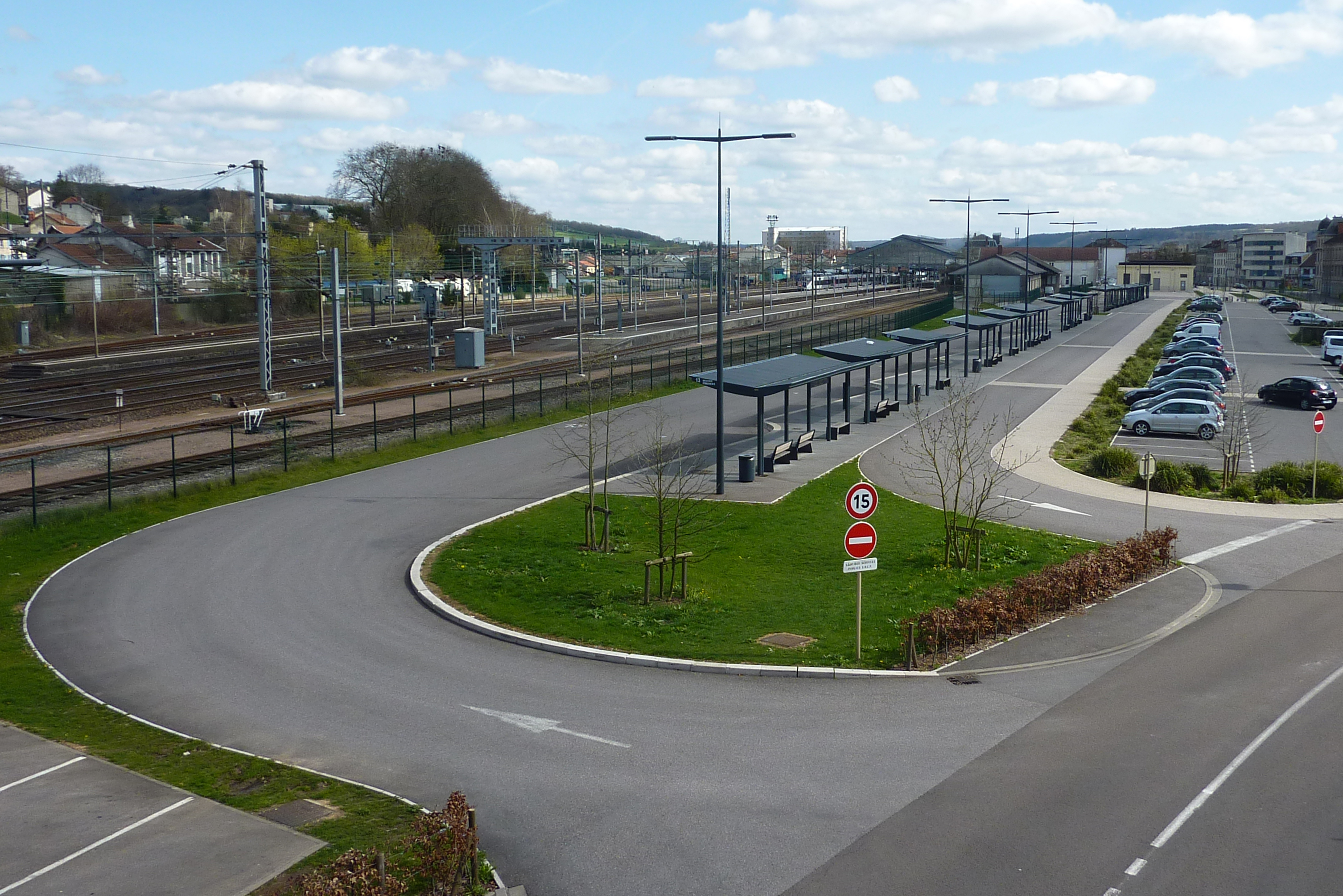 Gare routière du réseau RITM à Bar-le-Duc avec en arrière plan les voies ferrées.